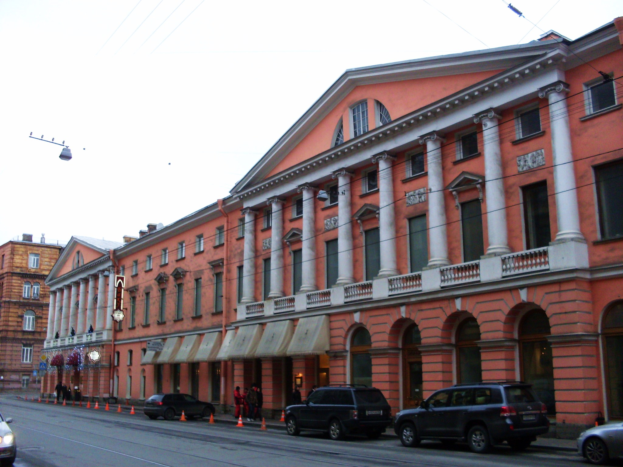 Дом с четырьмя колоннадами, Садовая 12, Санкт-Петербург